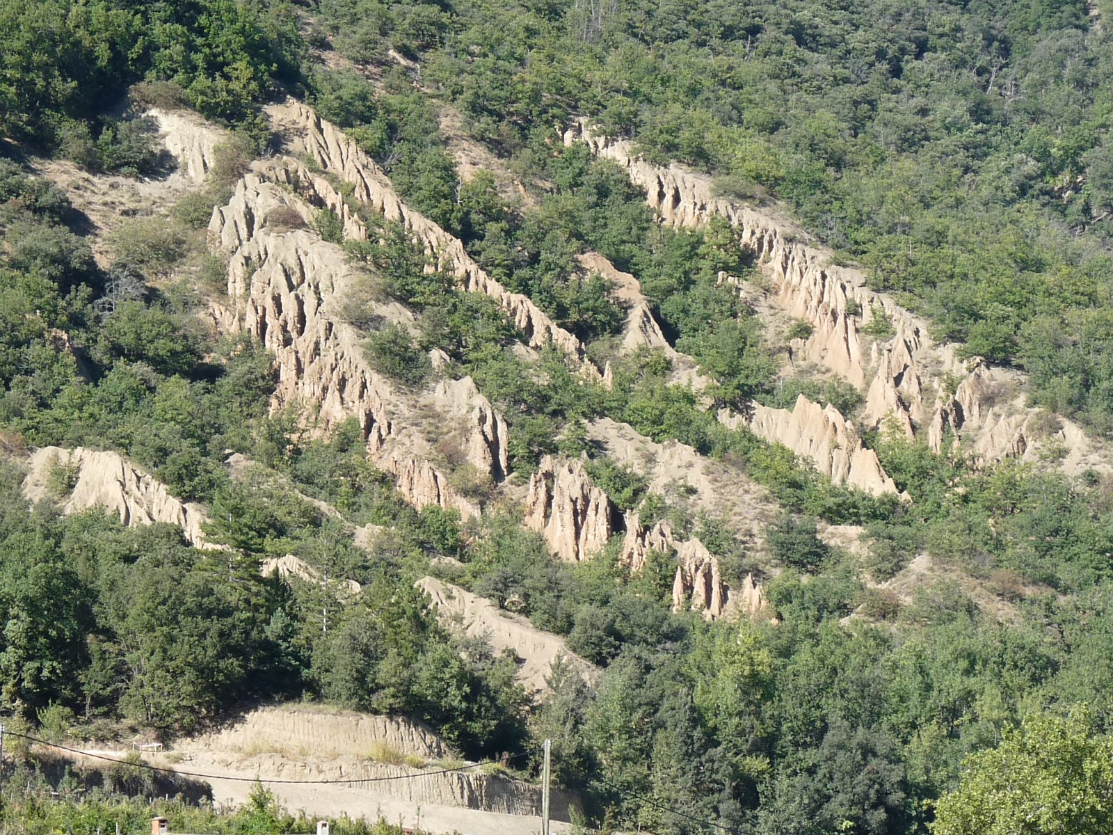 Colluvions de pente érodés, Joncet, Serdinya, Pyrénées-Orientales, France